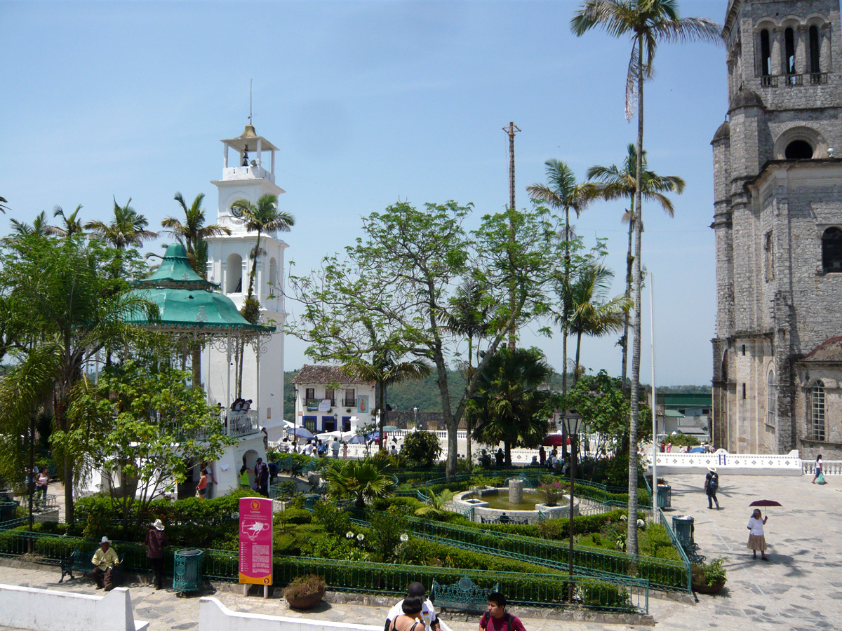 Sentrum av Cuetzalan i Puebla (Mexico)